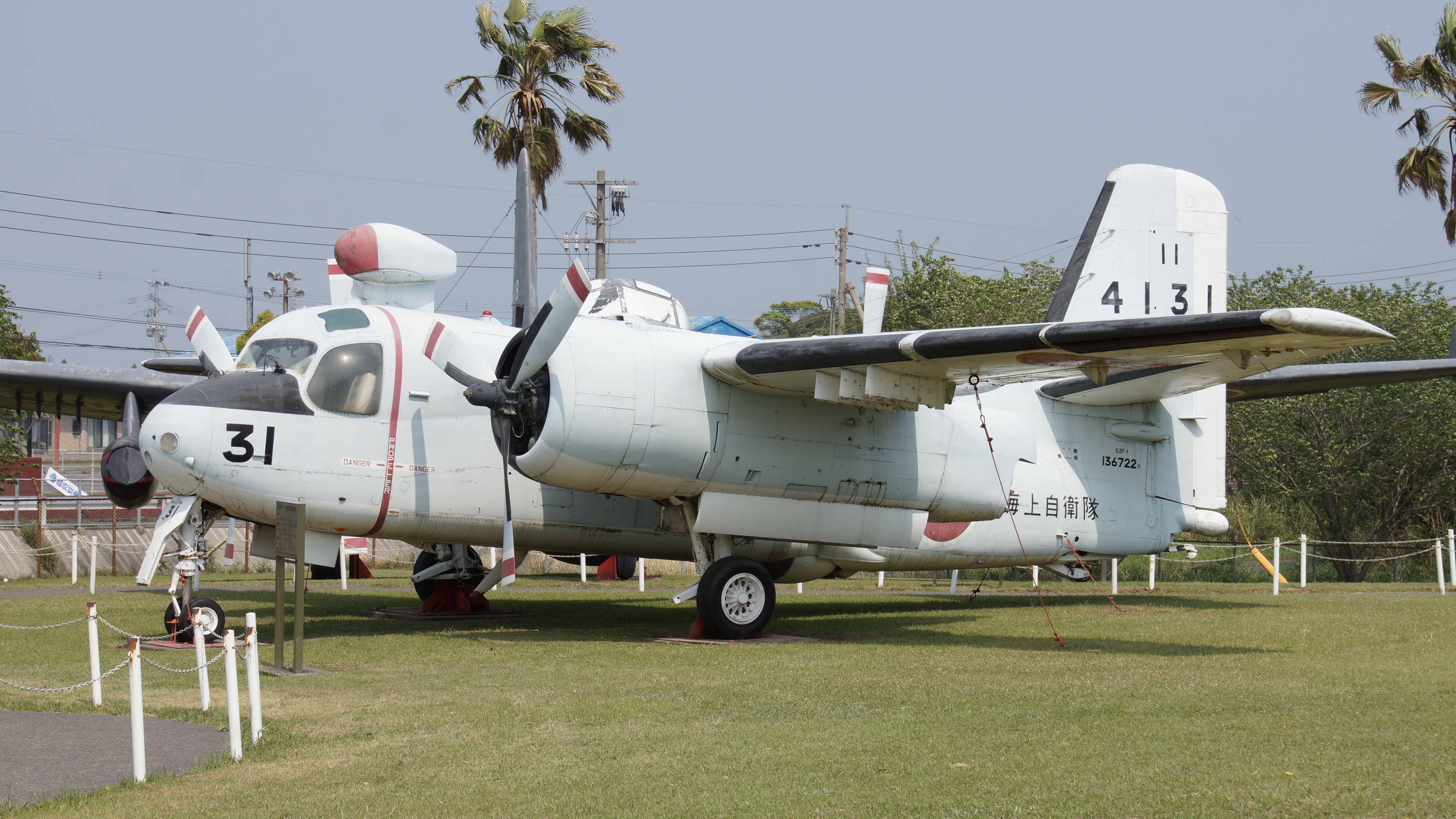 海上自衛隊 S2F-1対潜哨戒機（4131号機） 左前面。2017年4月29日 鹿屋航空基地史料館にて。